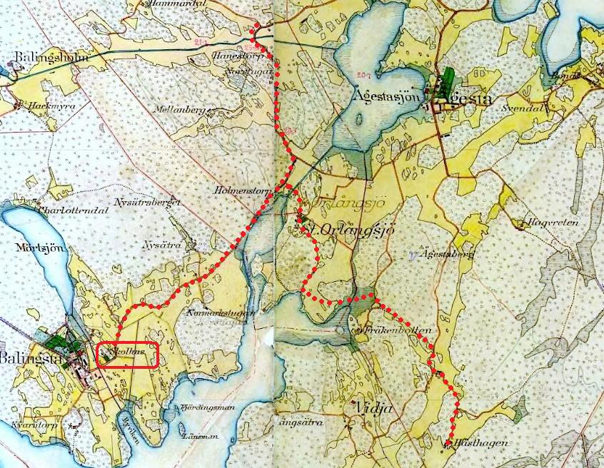 Karta över Orlångsjö (1901-1905) med "Skolleden" inritad